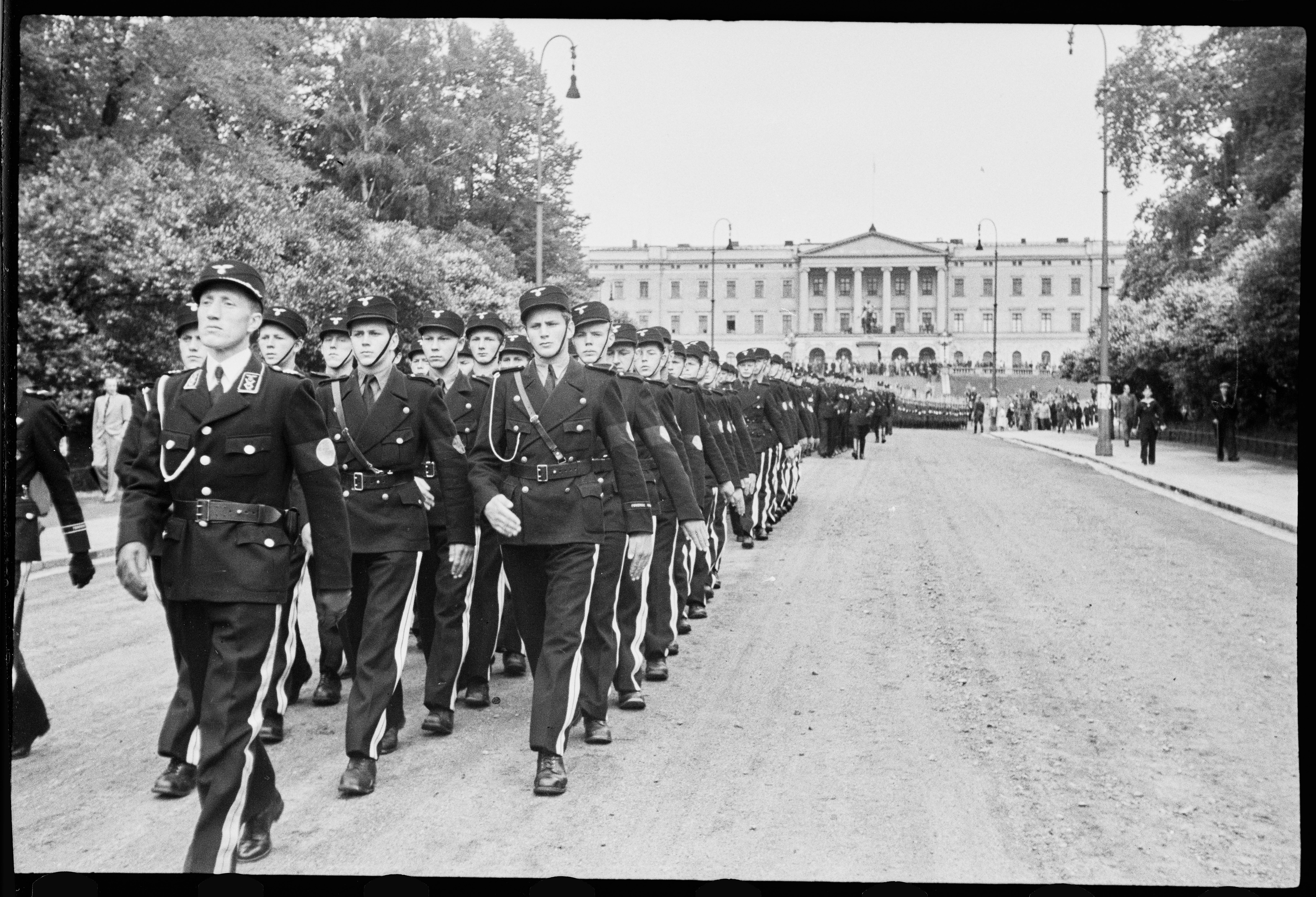 Reservebataljon Holmestrand paraderer for Quisling på Slottsplassen Fremst i troppen fra «Førerens garde» går Per Carlson. Han var løytnant i hærens flyvåpen før andre verdenskrig, ivrig hirdmann og «Gardesjef» fra 20. april 1942 til 1. april 1944. Jamfør Budstikka for Nasjonal Samlings tillitsmenn og hirdmenn i Telemark nr. 6 1944 Ifølge fortrolig «NYHETSOVERSIKT FRA SKANDINAVIA. Fra Regjeringens I.K. og Hærens overkommando. (...) Meldinger söndag 14. juni. (1942)» foregikk paraden slik: «Reservebataljon Holmestrand mönstrer. (...) Imorges fant det sted en mönstring av reservebataljon Holmestrand av Den norske legion på Slottsplassen. Samtidig mönstret avdelinger av "förerens" garde, rikshirden og beredskapspolitiet. Avdelingene tok oppstilling i åpen firkant. På den ene siden stod legionens avdeling og dens musikkorps med front mot slottet med "förerens" garde og rikshirden på den annen side av beredskapspolitiet. Mange mennesker hadde innfunnet seg for å overvære mönstringen. Blant de frammötte såes samtlige "ministre", representanter for riksledelsen og en rekke andre representanter for stat og parti. "Föreren" ankom i bil presis kl. 09.30. Etter å ha inspisert avdelingene sammen med Jonas Lie og andre holdt han en kort tale.» Terje Emberland skriver i boka Himmlers Norge: «Som Kongsvinger festning var leiren i Holmestrand en SS-innretning som tjente til å forberede nordmenn på det fremtidige SS-kontrollerte Norge. På ulike tidspunkter var det senter for opplæring av Hirden, Den norske legions reservebataljon og Vaktbataljonen.»